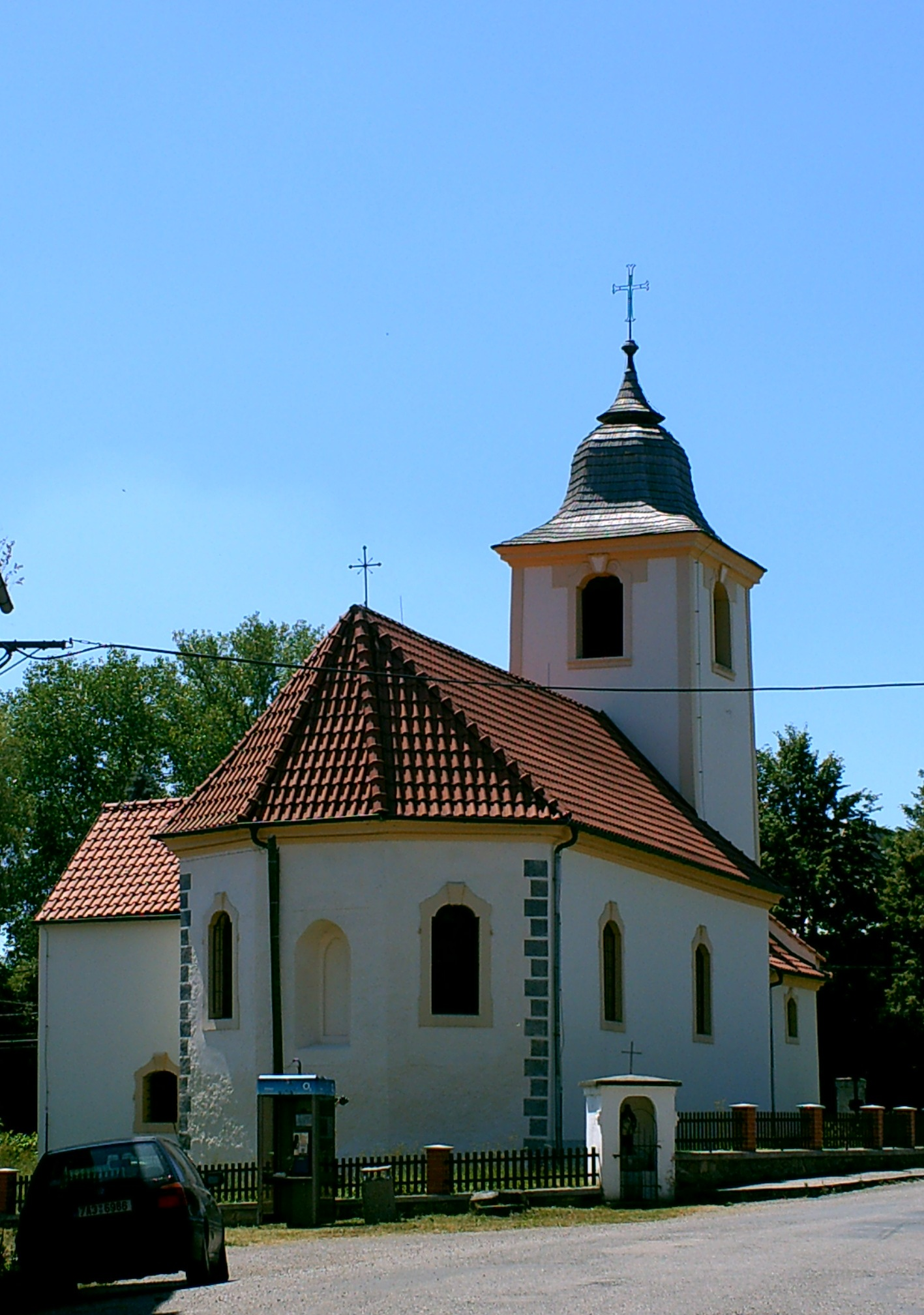 Kostel sv. Jakuba v Popovicích